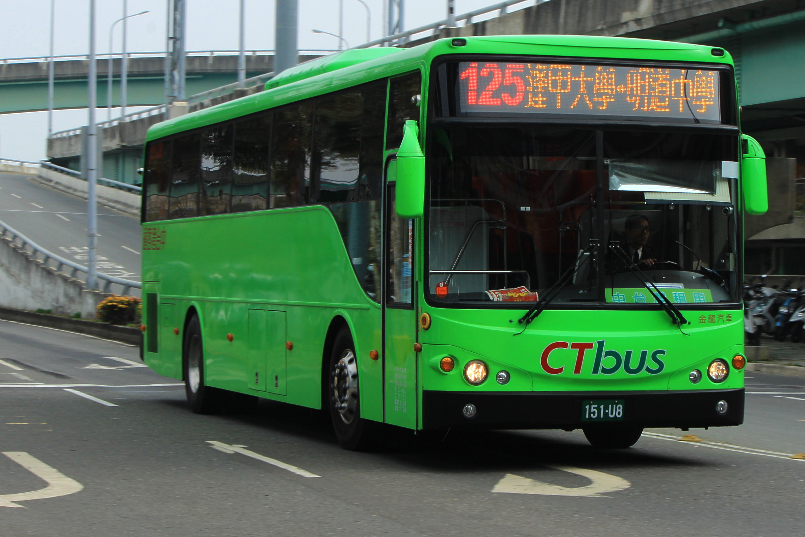 高鐵台中站